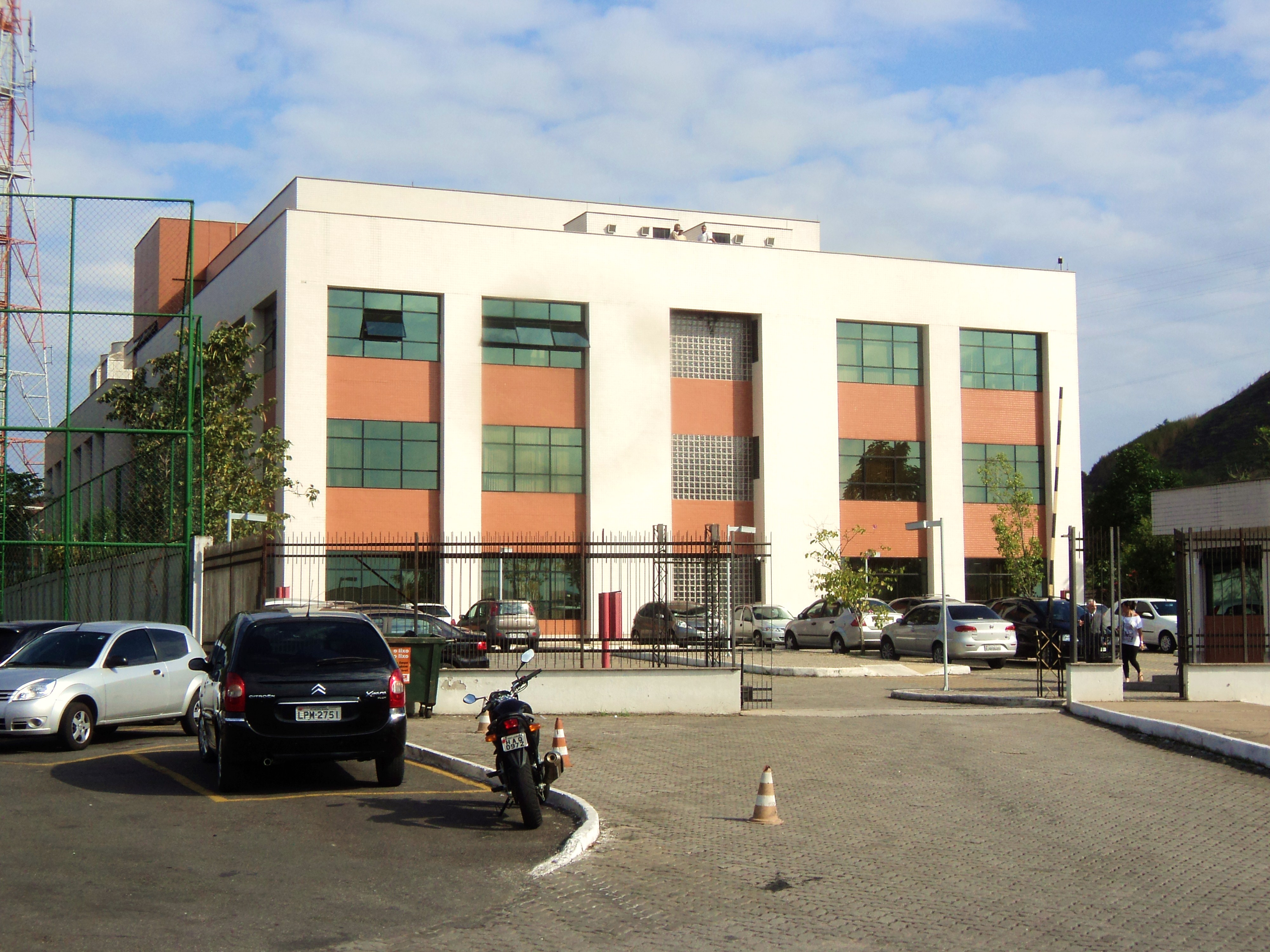 Forum da cidade de Barra Mansa, estado do Rio de Janeiro, Brasil.